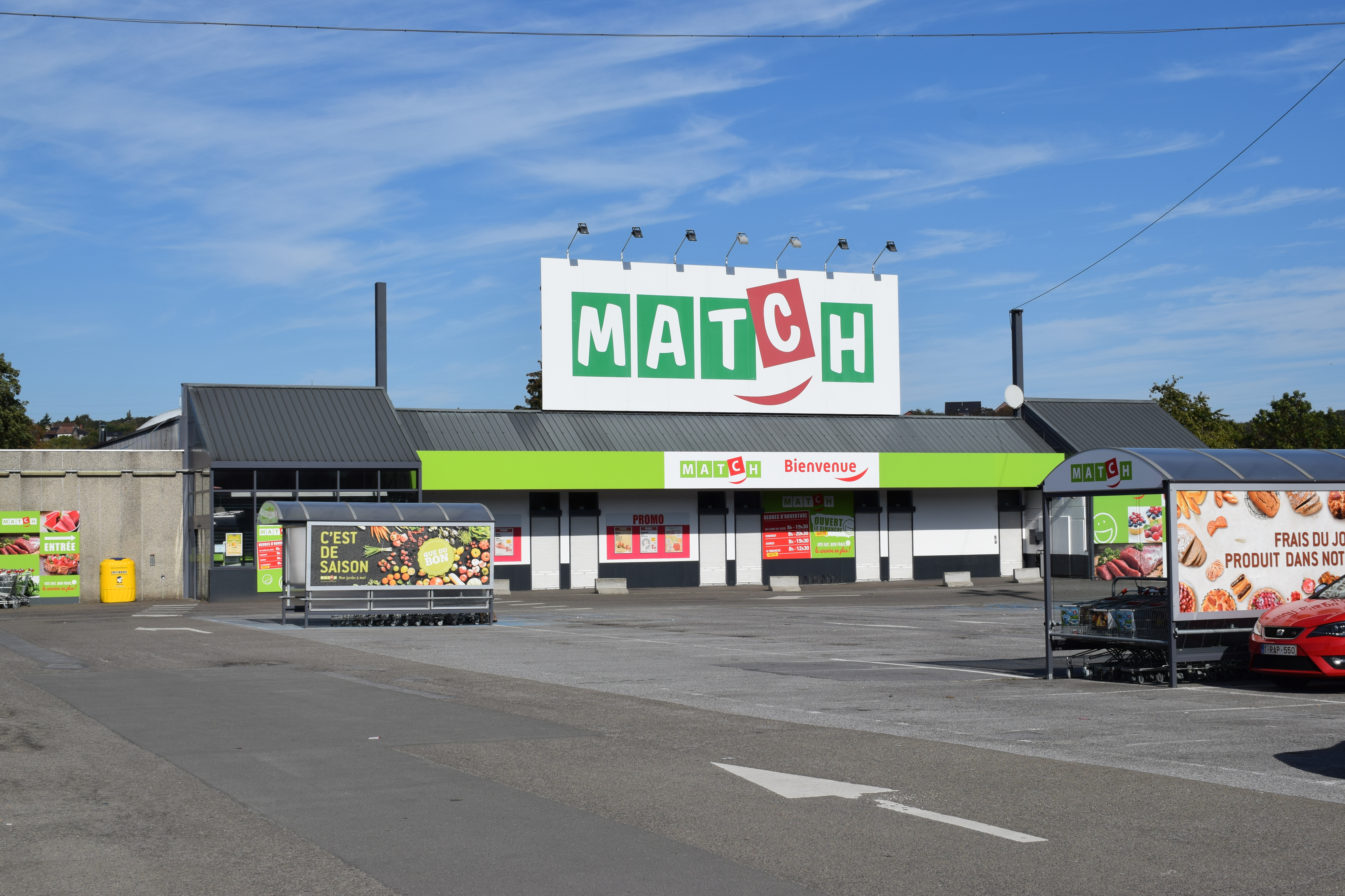 Vue d'Andenne, sur la rive droite de la Meuse, dans la province de Namur en Belgique.